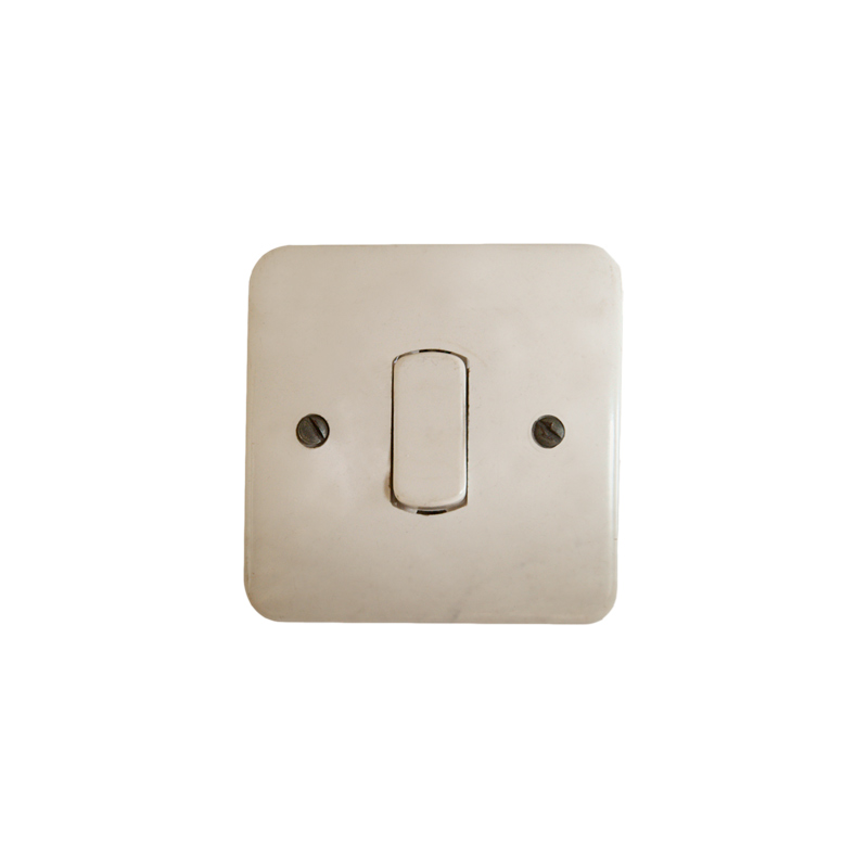 Wyłącznik jednobiegunowy, 1971 rok. Ówczesna nazwa producenta: Fabryka Sprzętu Elektrotechnicznego „KONTAKT” z siedzibą w Czechowicach - Dziedzicach.